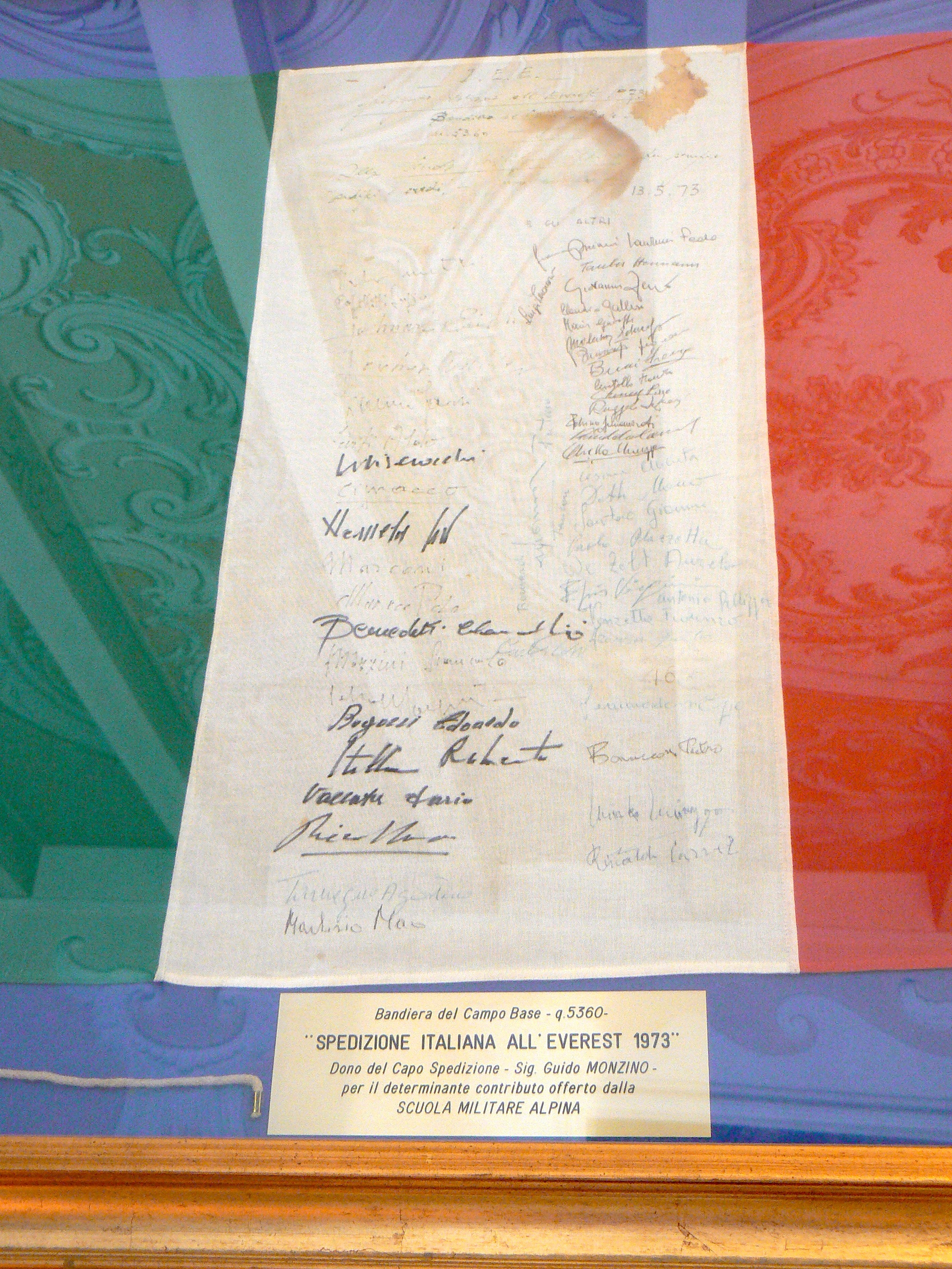 Bandiera della spedizione italiana al Monte Everest del 1973, con le firme dei protagonisti. Conservata nel Museo dell'alpinismo del Castello Jocteau, Aosta, Valle d'Aosta, Italia.